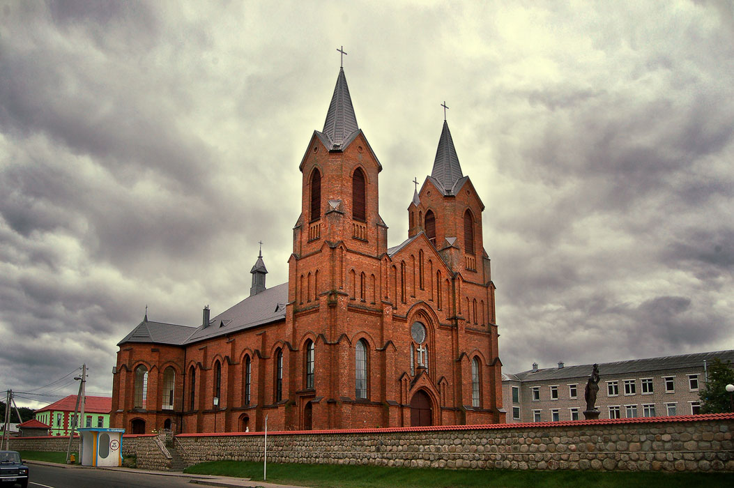 Беларуская (тарашкевіца): Усьпенскі касьцёл. г. Мёры This is a photo of Belarusian heritage monument. Reference number: 213Г000551 ( WLM)